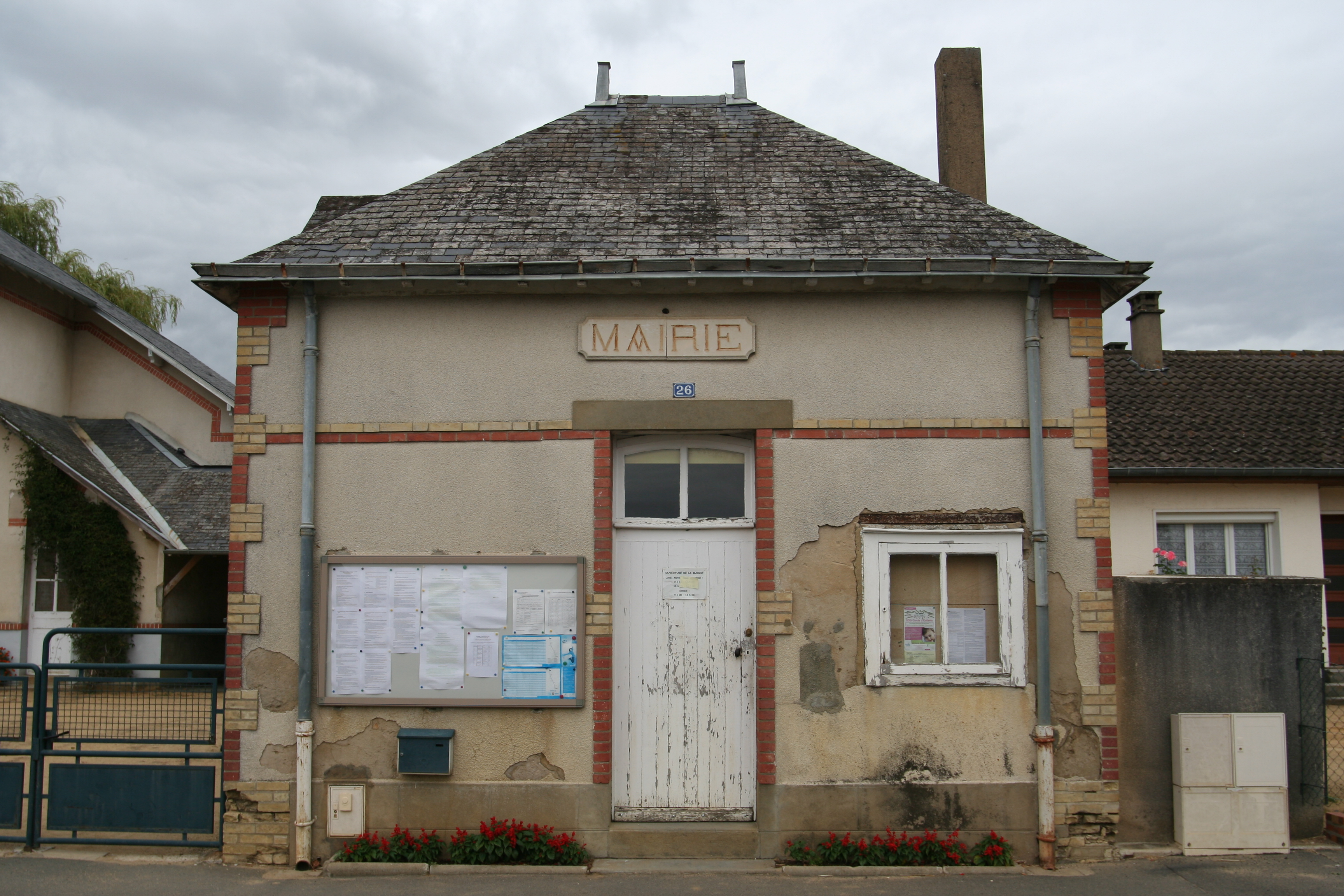 La mairie de Fatines.